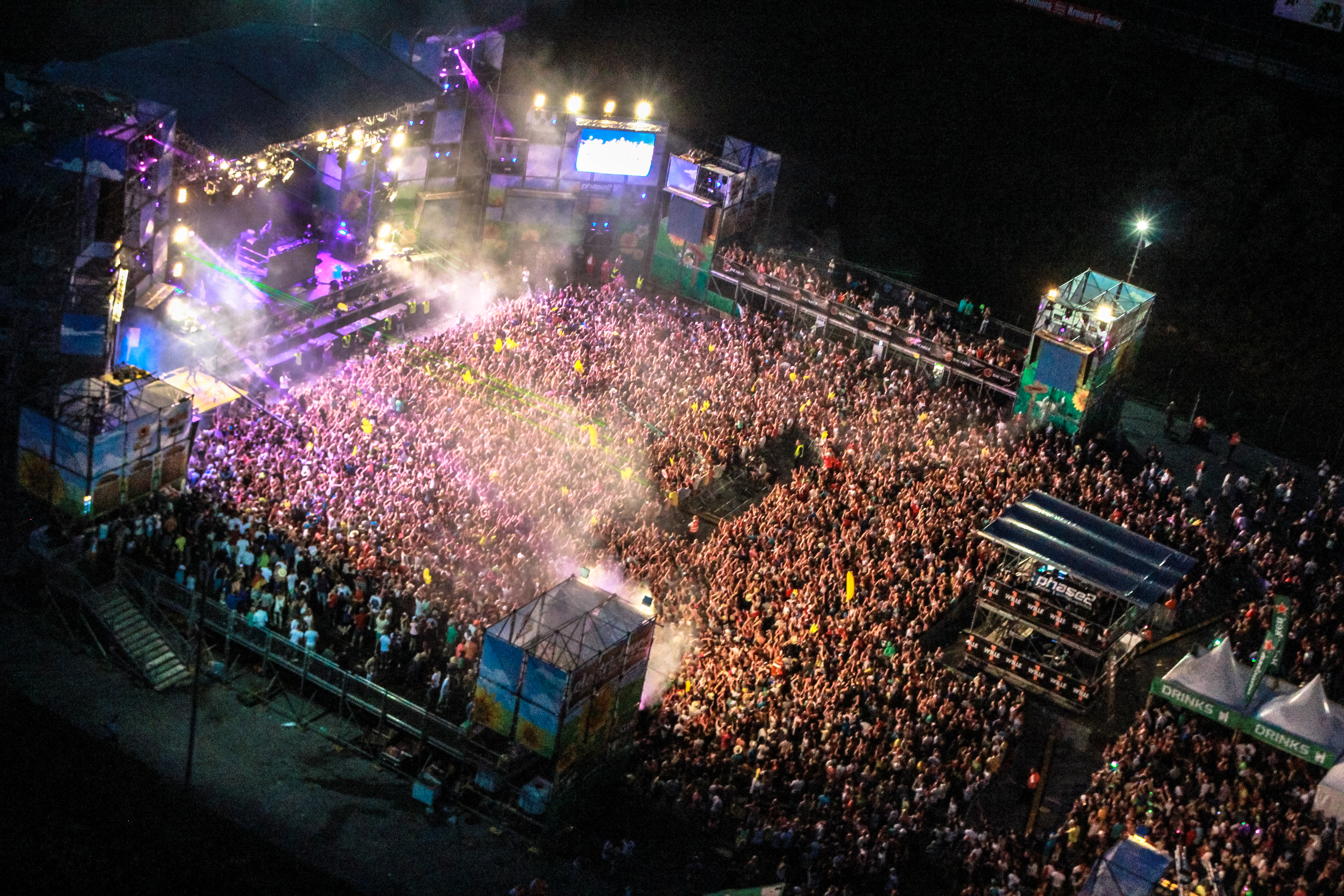 Electric Love Festival